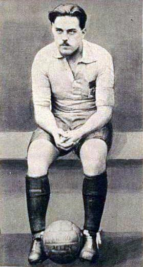 Paul Nicolas en 1924.